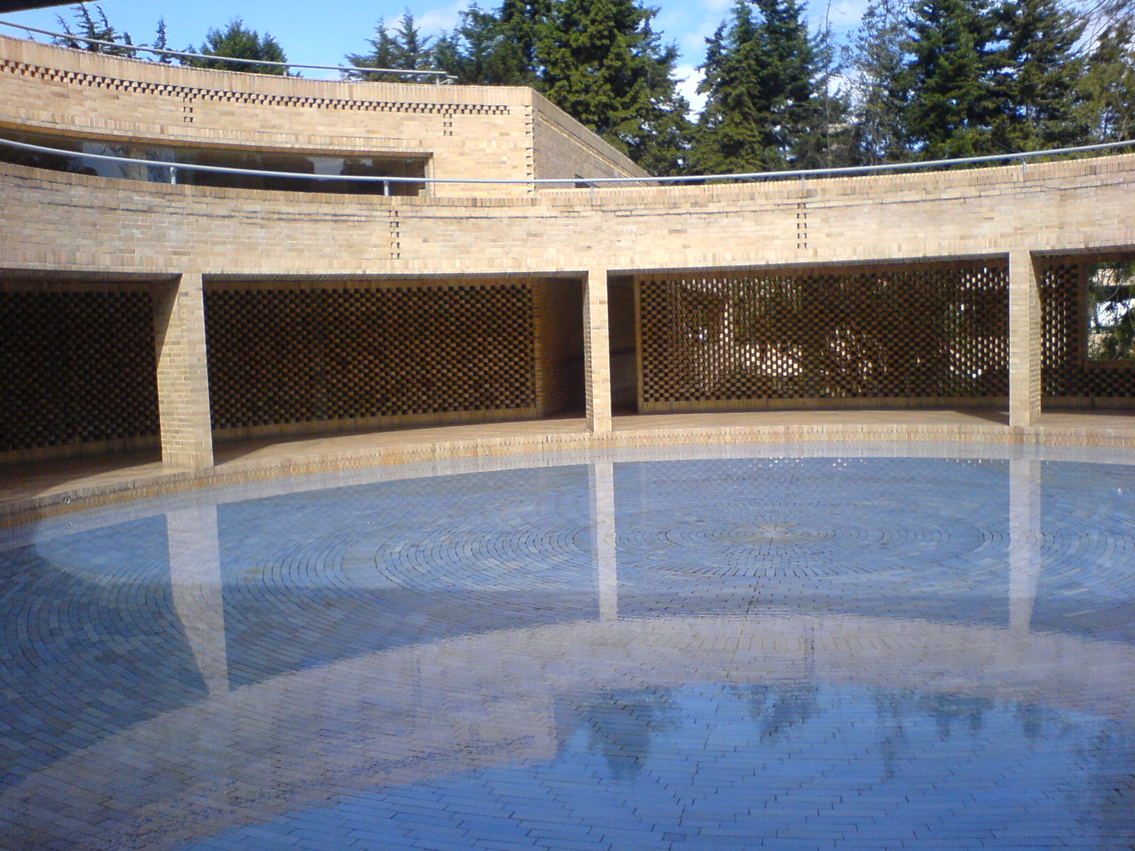 Espejo de Agua edificio Posgrados de Humanidades